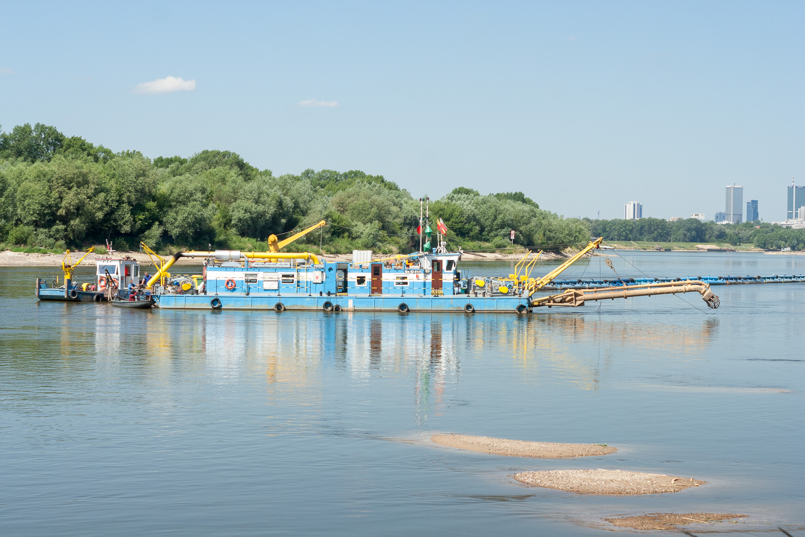 Tzw. piaskarka (pogłębiarka ssąco - refulacyjna) „Sawa” na Wiśle w Warszawie tuż poniżej Mostu Siekierkowskiego, na wysokości Ujęcia Uzupełniającego nr 2. Widoczna jest głowica ssąca. This is a photography of Natura 2000 protected area with ID PLB140004